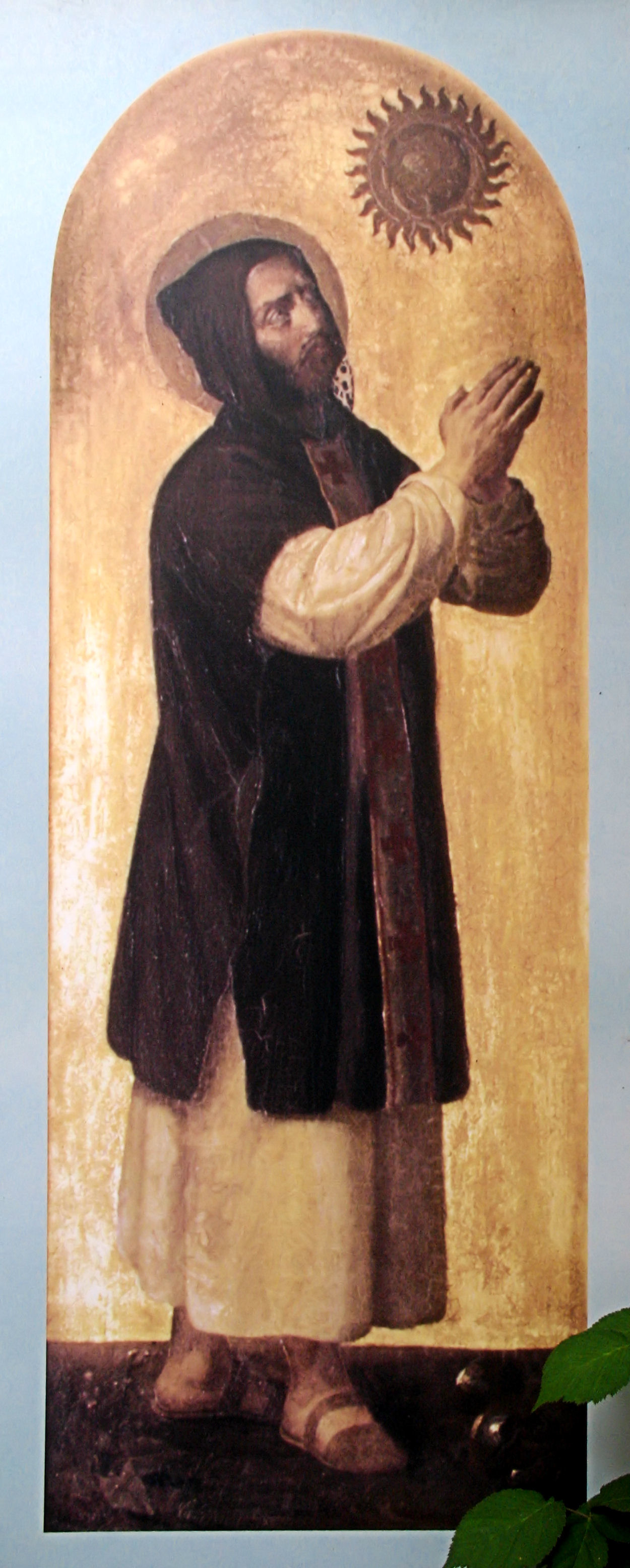 Abbildung des Heiligen Benedikt in der Pfarrkirche St. Benedikt im Münchner „Westend“ (Schwanthalerhöhe)